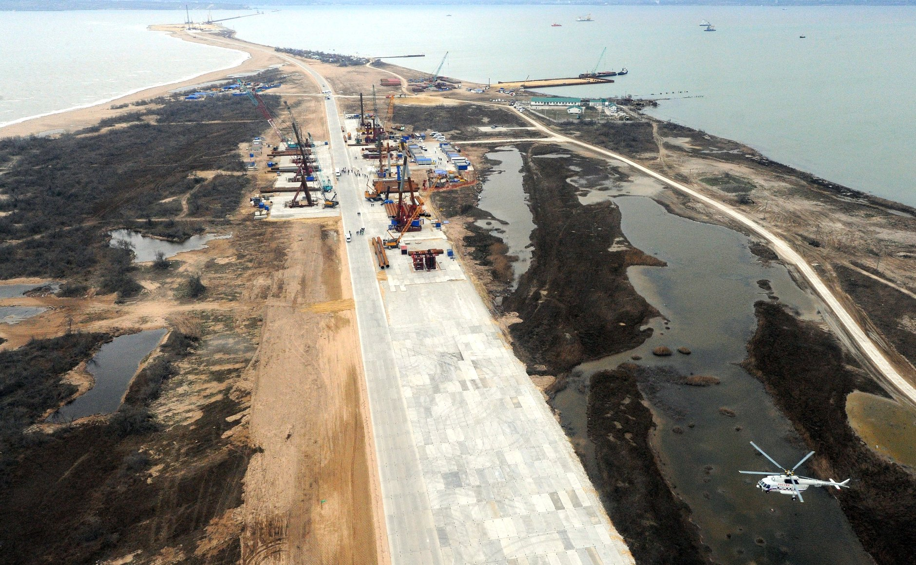 Район строительства Крымского моста